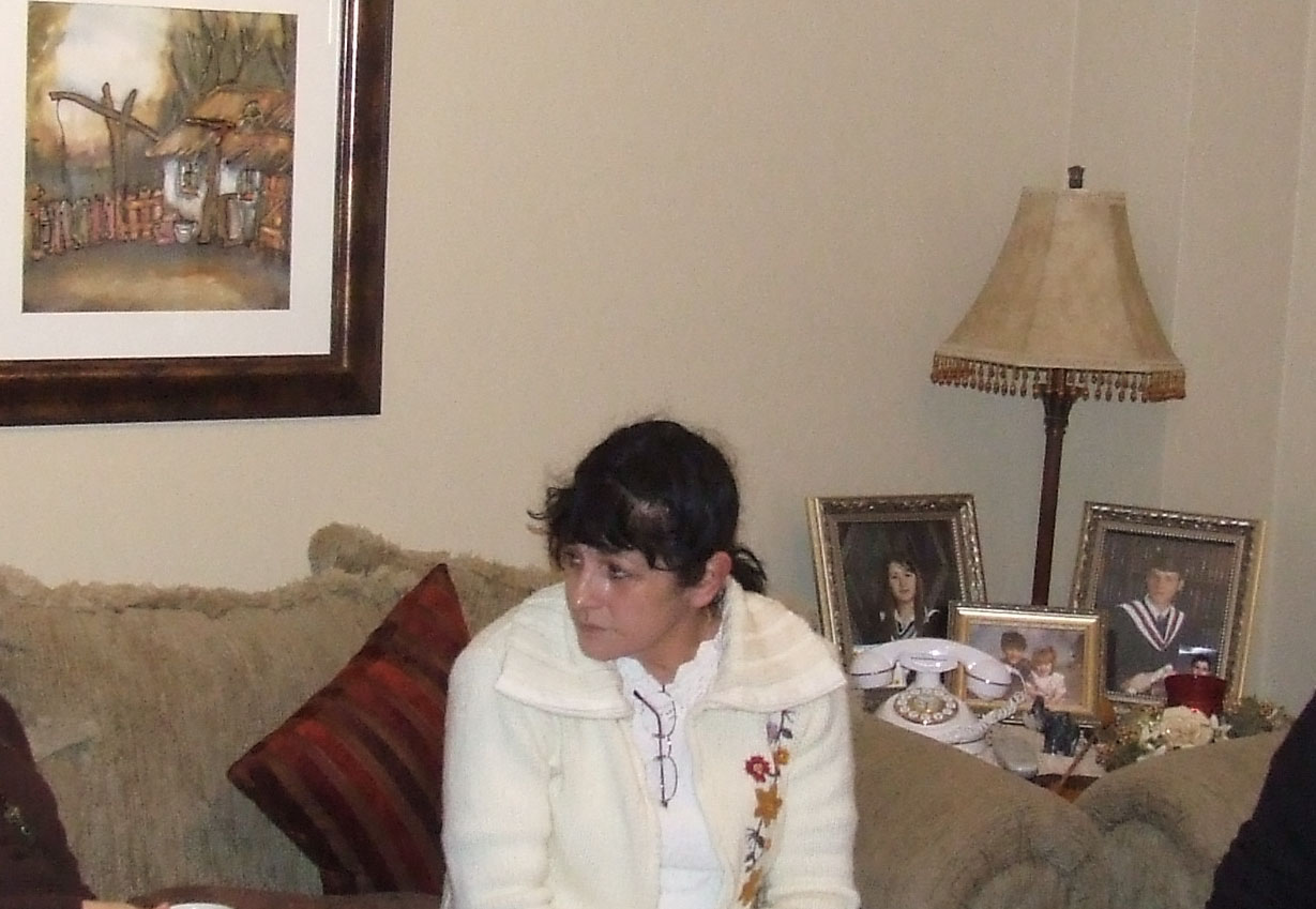 Mara Markovic